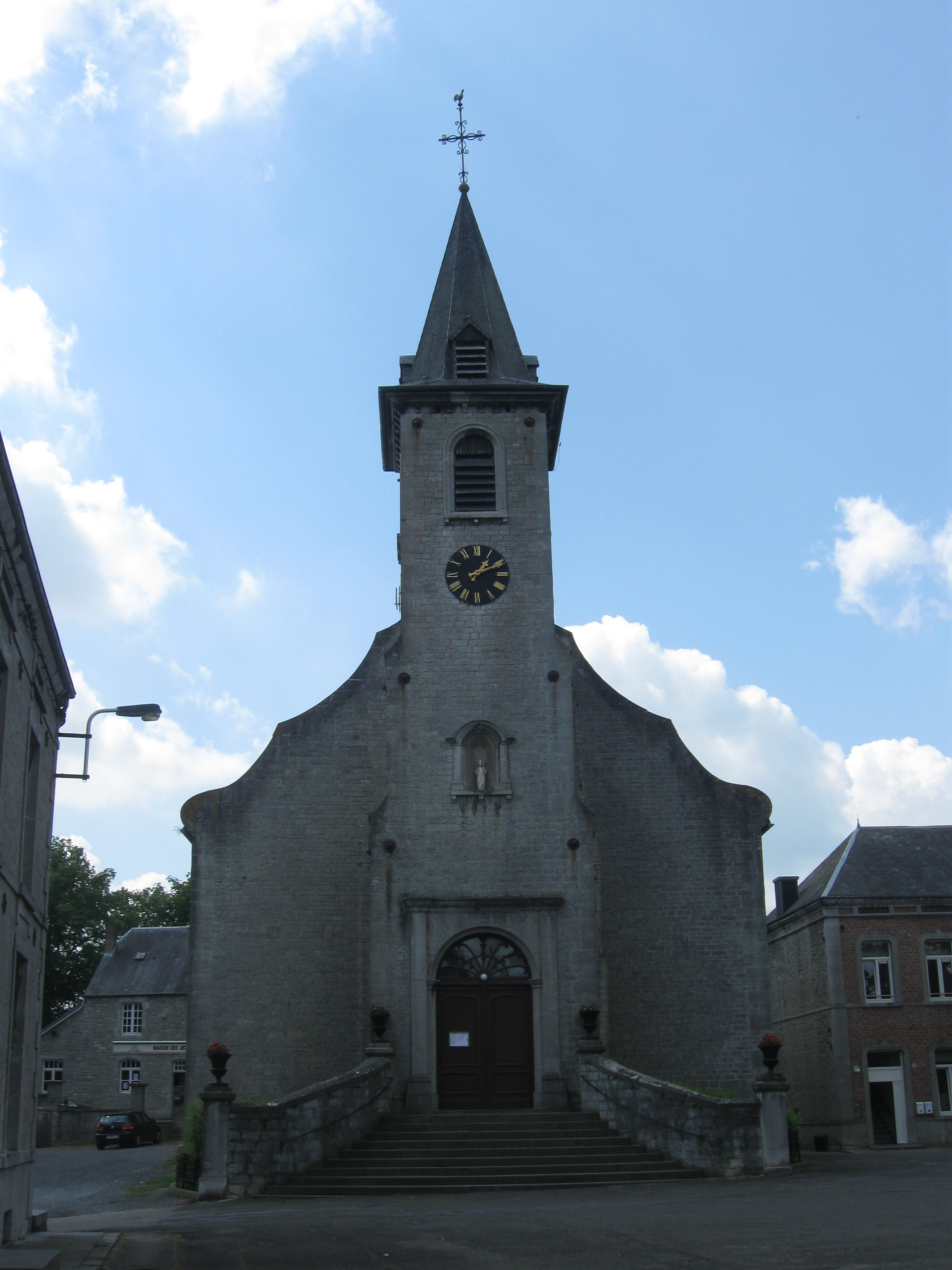 église de Frasnes